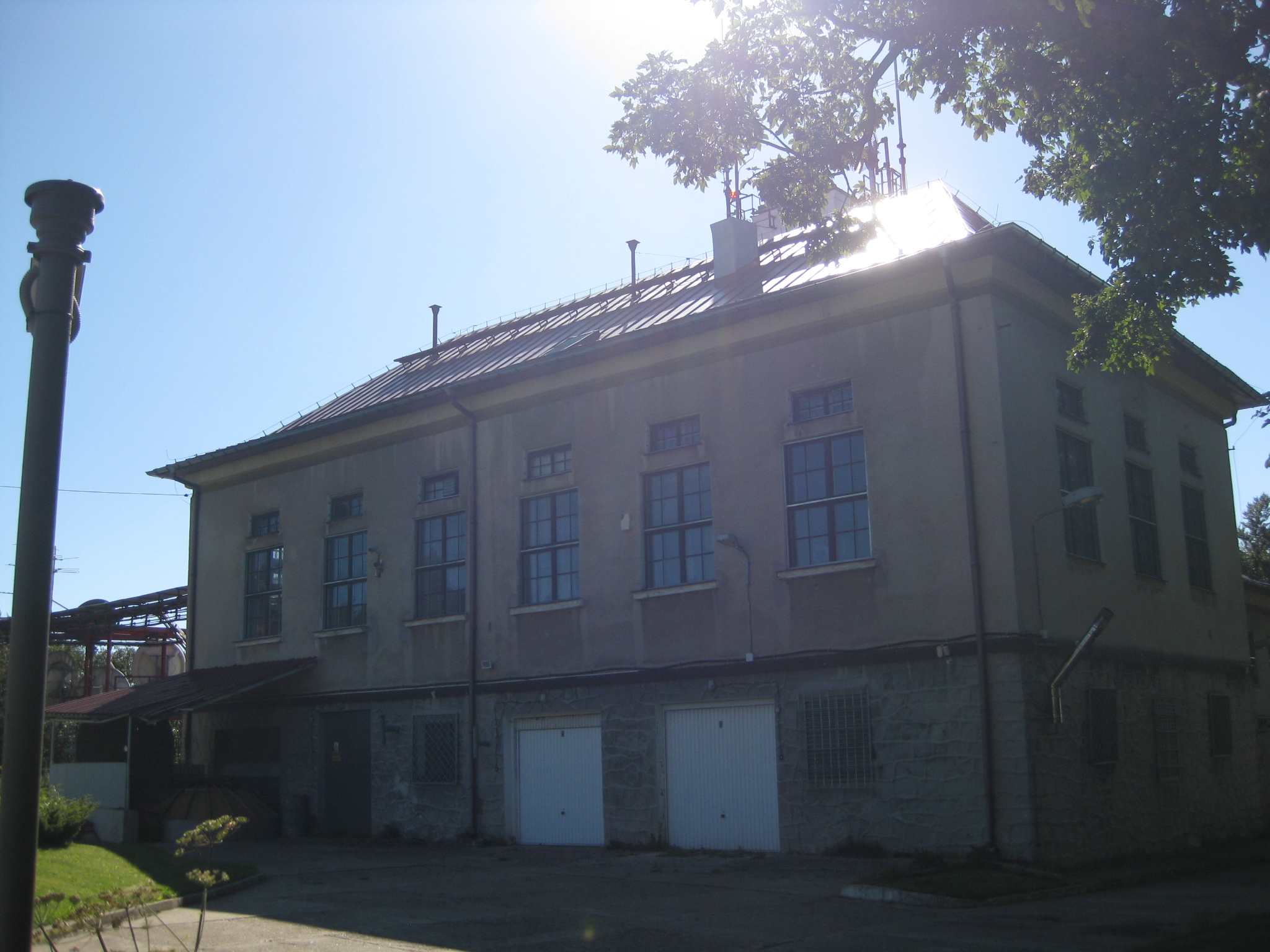 Budynek przy antenie RTV na Chełmcu.